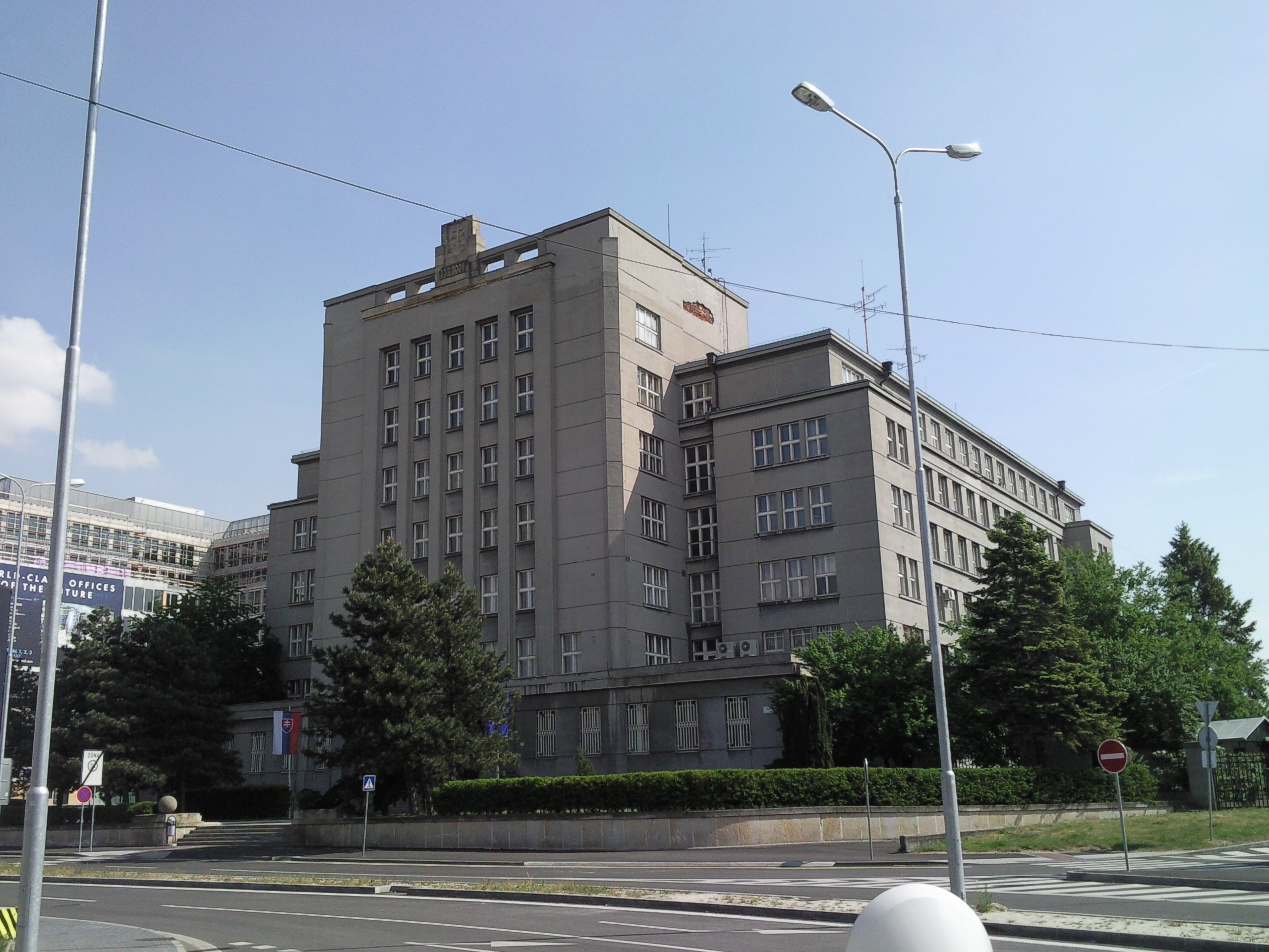 MV SR a Eurovea